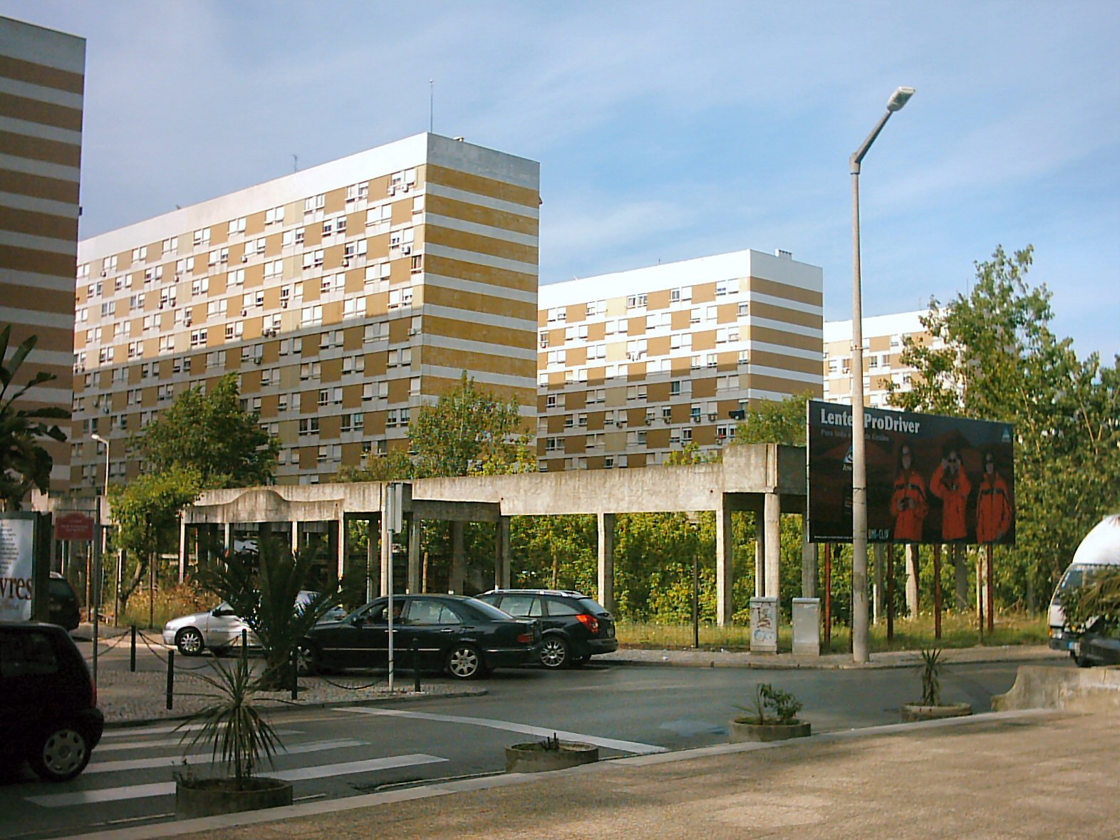 Vista da Freguesia da Portela no Concelho de Loures